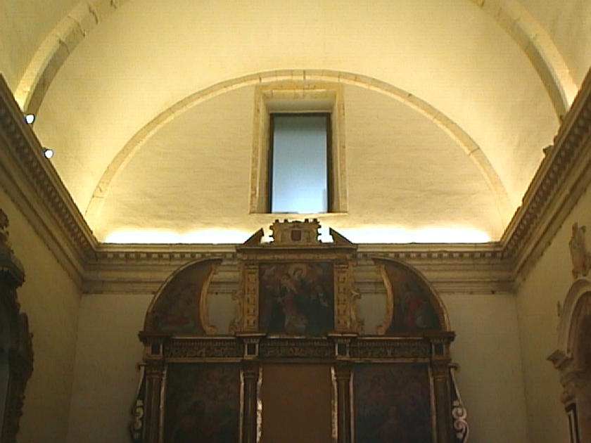 Scorcio del braccio sinistro del transetto, chiesa di Sant'Agostino (XVI secolo) a Cagliari